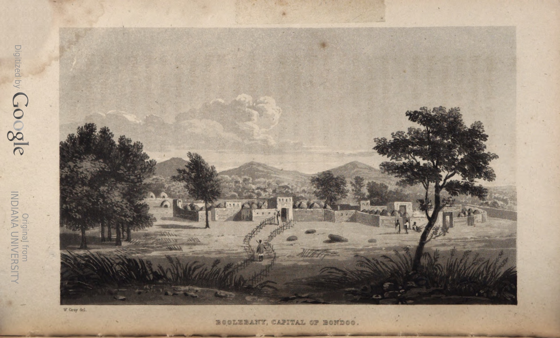 La capitale du royaume de Boundou vue par des explorateurs anglais en 1820, tirée du livre Travels in Western Africa, in the years 1818, 19, 20, and 21 par le Major William Gray et le chirurgien Dochard, publié par J. Murray, Londres, 1825.